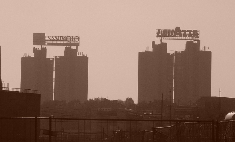 io